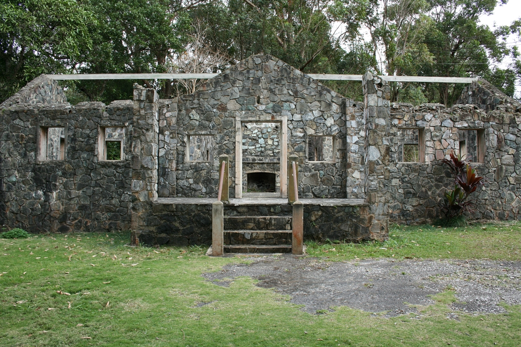 Casa de Piedra, located in Monte del Estado (Maricao State Forest), Maricao, Puerto Rico.